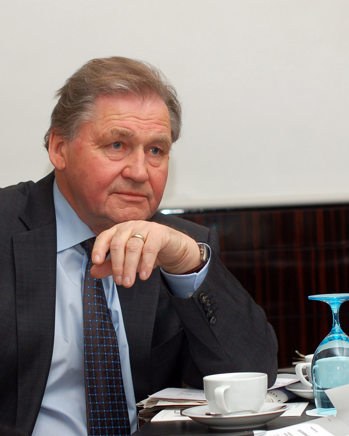 Pressekonferenz euronews im Hotel Intercontinental Jürgen Vahlberg, Marketingdirektor